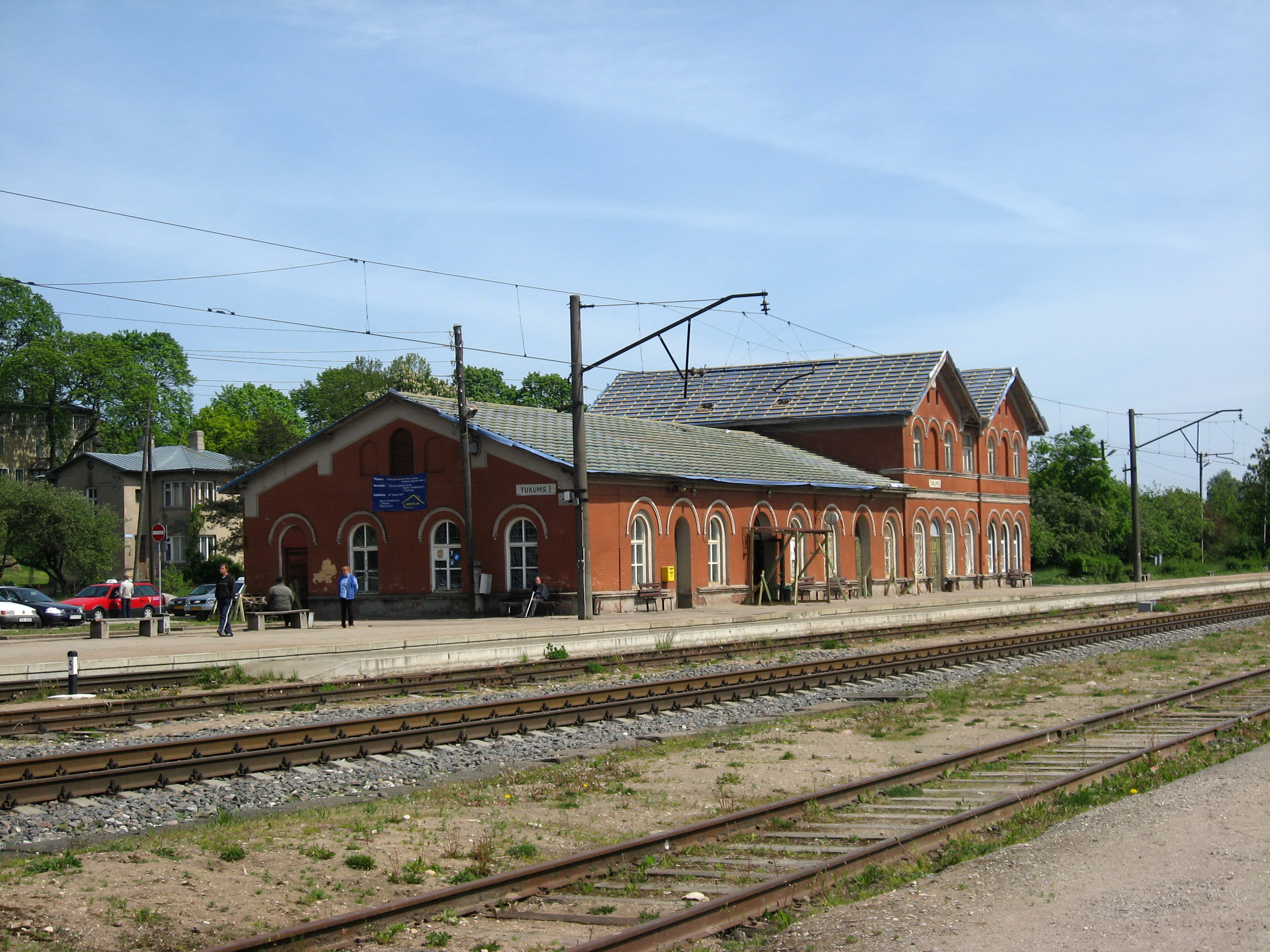 Nádraží Tukums I.